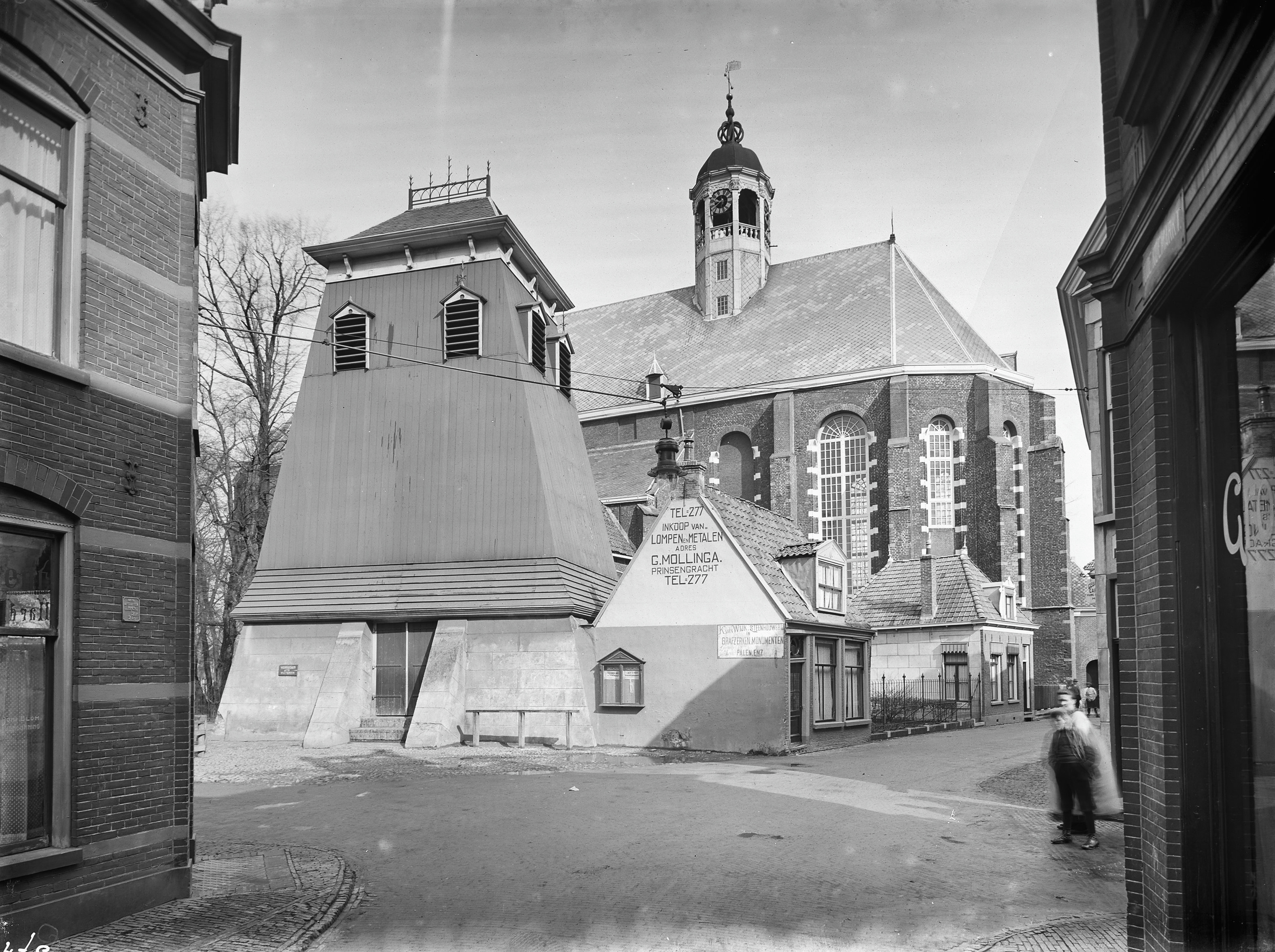 Nederlands Hervormde Kerk: kerk naar het noord-westen (opmerking: Fotonummer 9870)